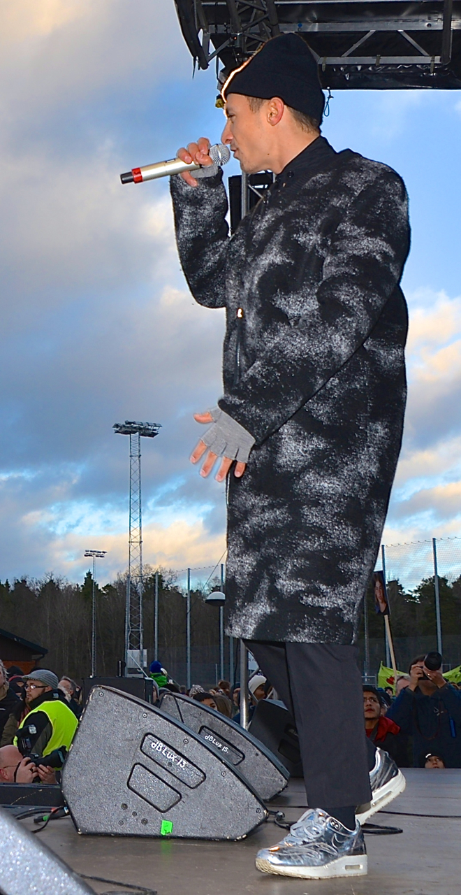 Daniel Adams-Ray på antirasistdemonstrationen i Kärrtorp den 22 december 2013.